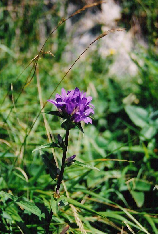 Campanula glomerata - Campanule agglomérée, Boutx.